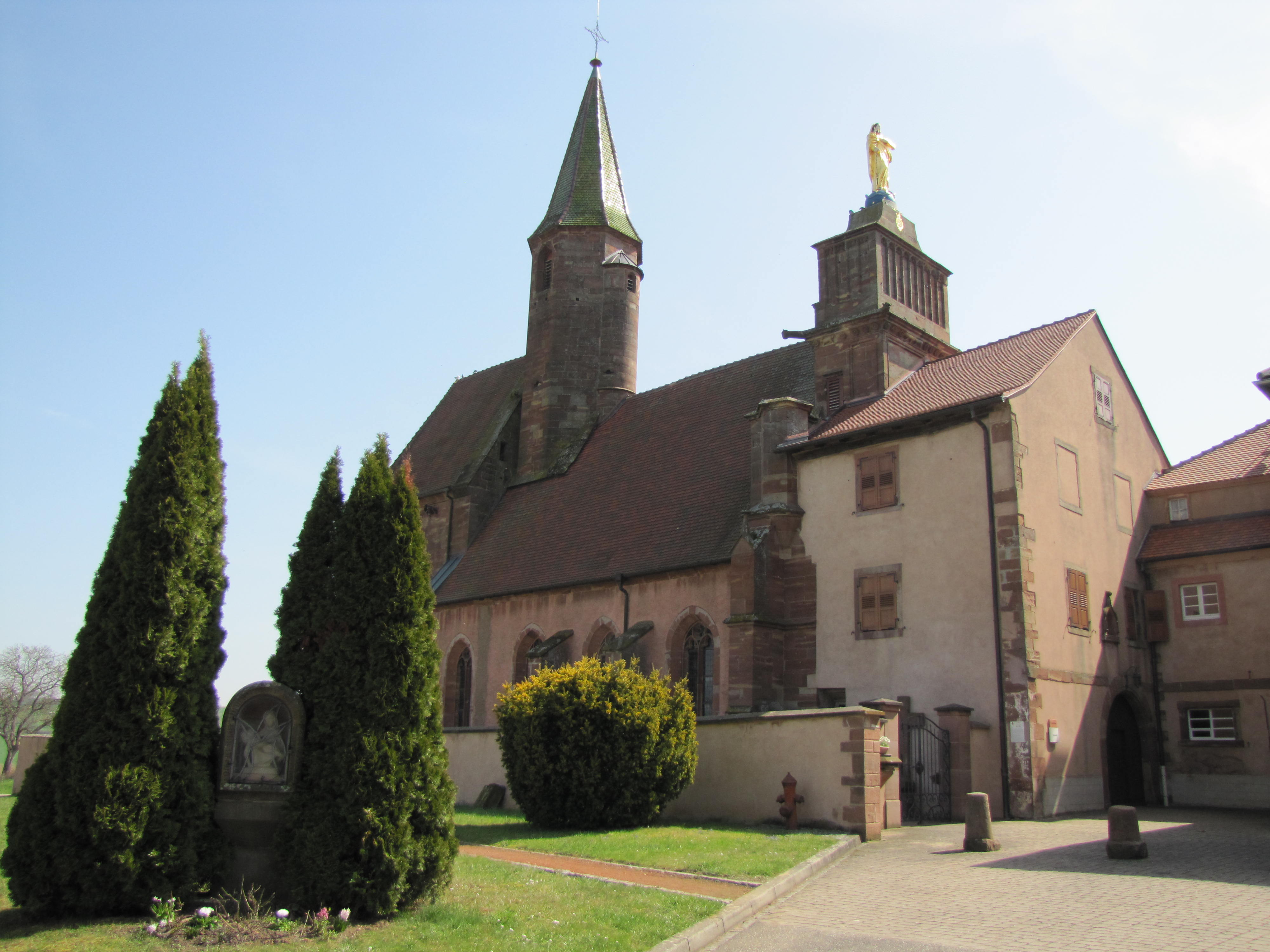 Alsace, Bas-Rhin, Reutenbourg, Couvent de Reinacker, Église de la Vierge et de la Sainte-Croix (PA00084902, IA67007633).